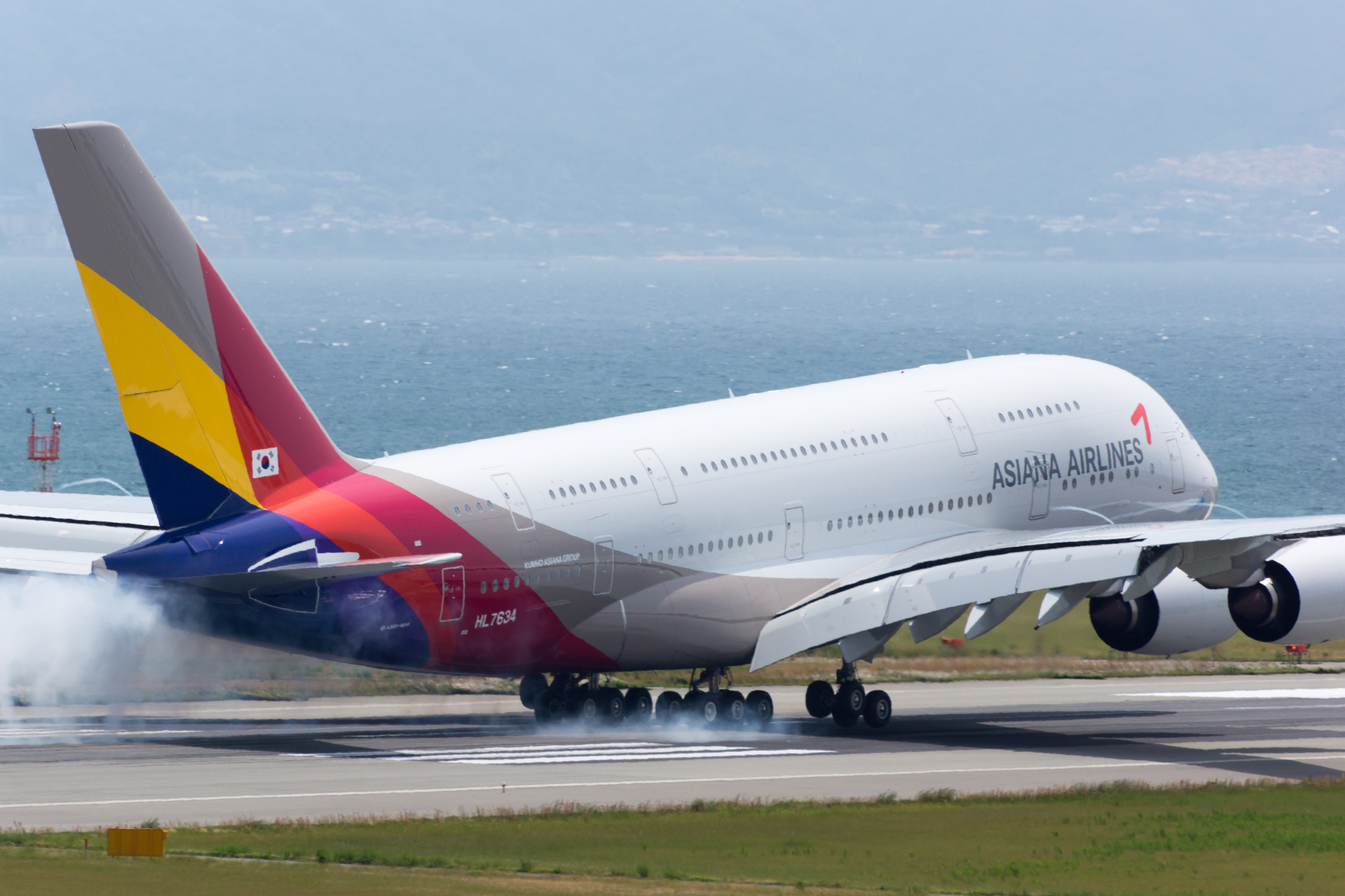 Asiana Airlines/ 아시아나항공/ アシアナ航空 Airbus A380-841 HL7634 OZ112,Arrived from Seoul Osaka Kansai Int'l Airport